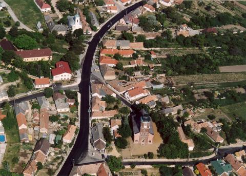 Felsőörs, Hungary, aerialphotography